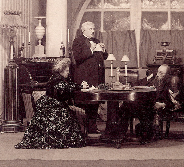 The play " The Fruits of Enlightenment " 1911